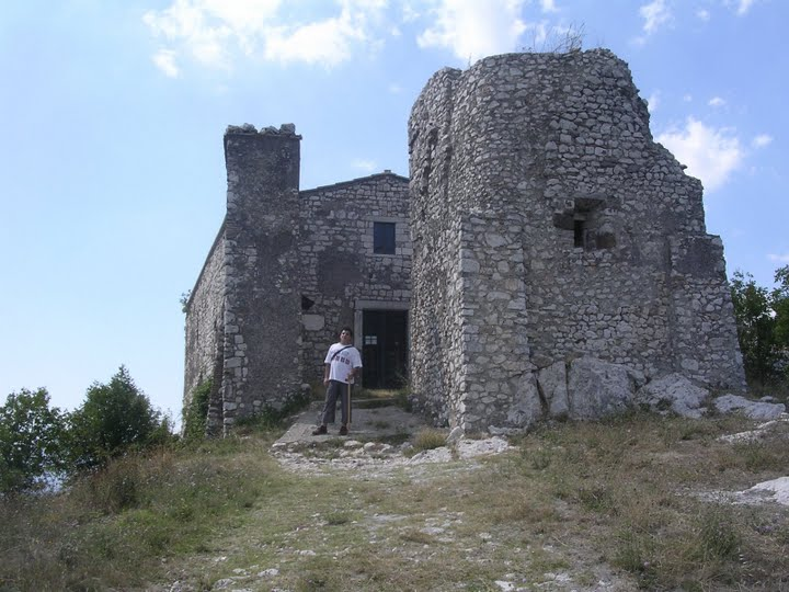 Abazia di S.Silvestro